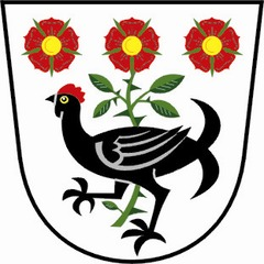 znak obce Ublo